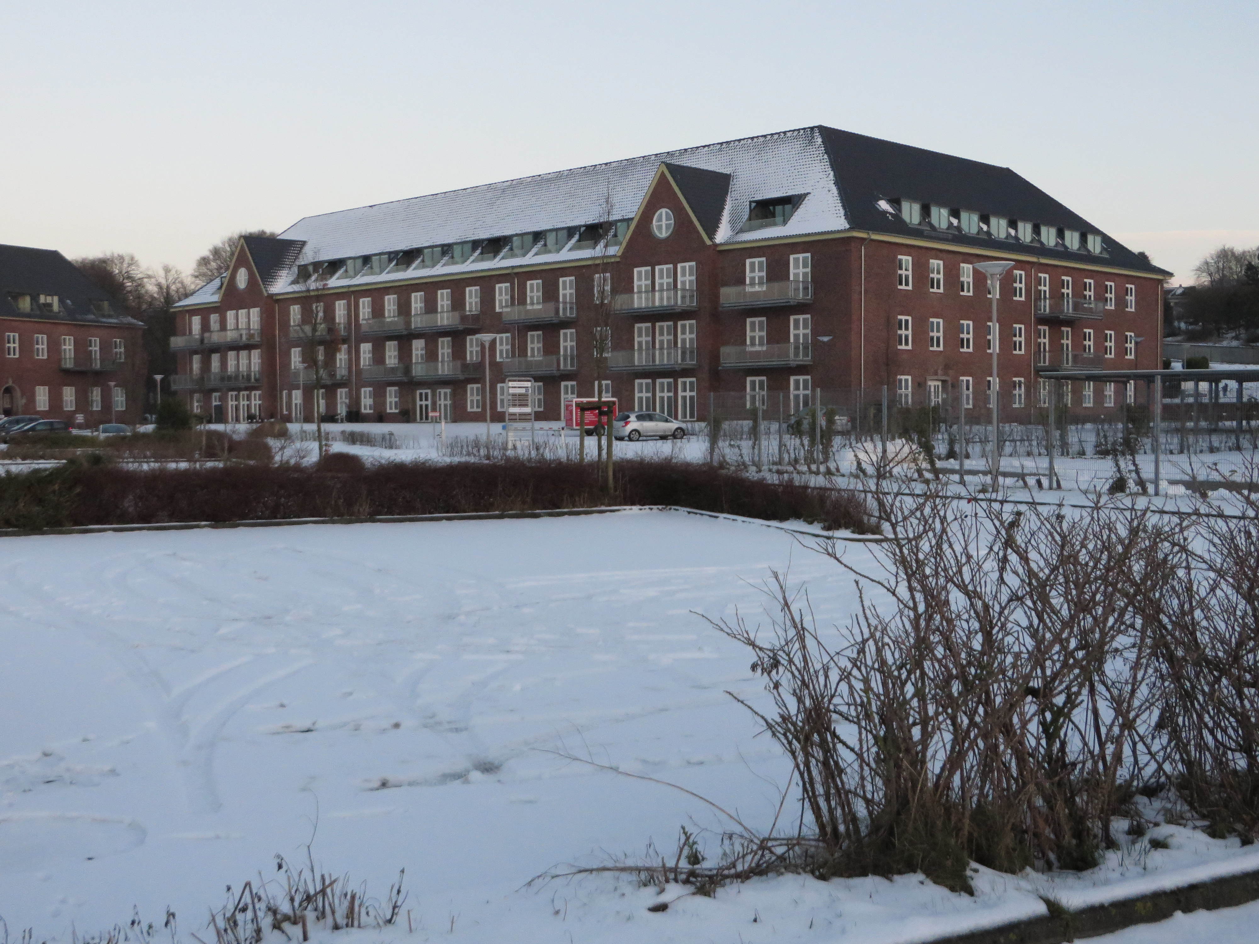 Bonte-Kaserne im Winter (Mürwik Januar 2015)